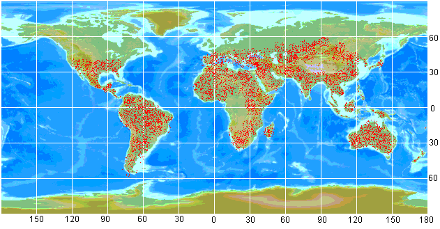 Répartition du genre Latrodectus.